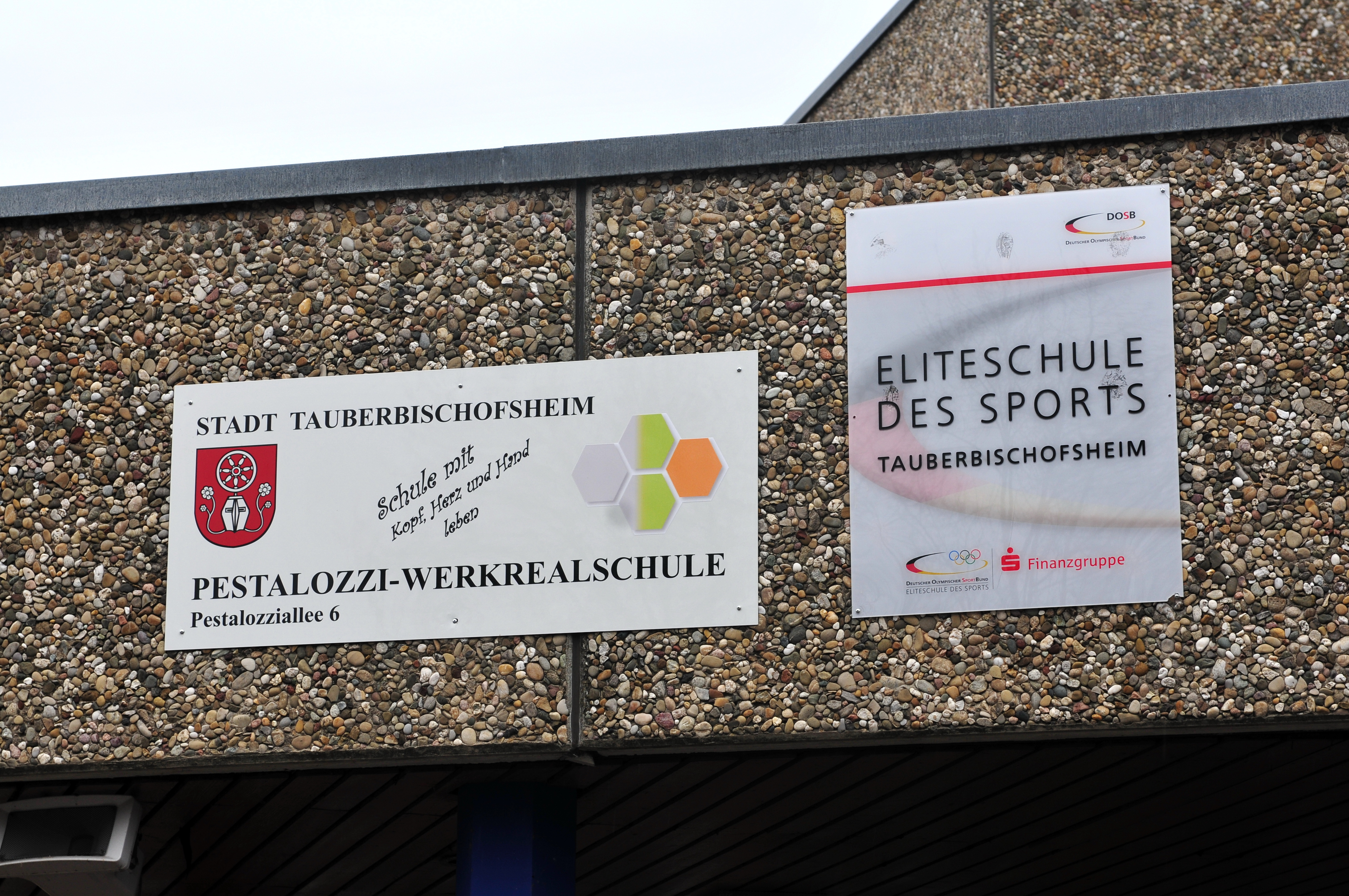 Tauberbischofsheim